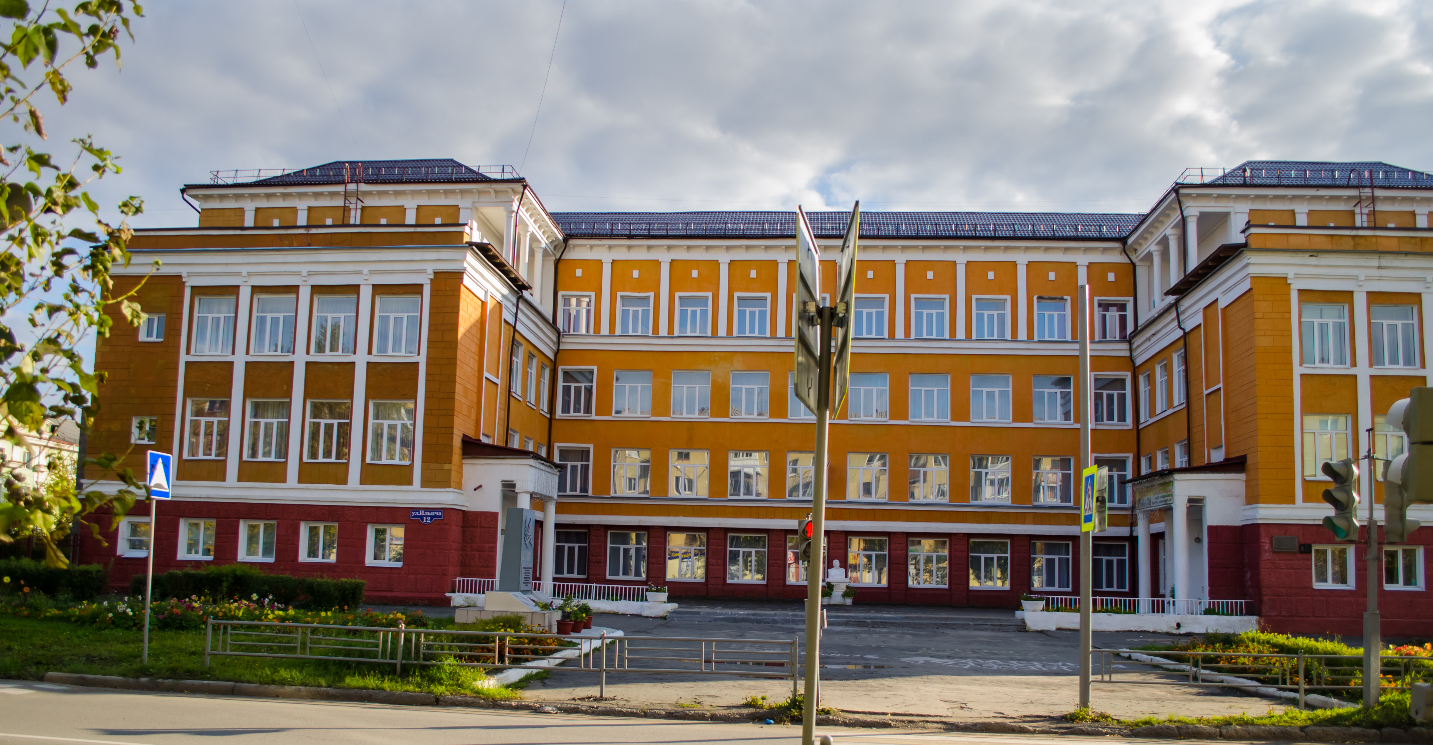 Здание, в котором размещался эвакогоспиталь № 2553: улица Ильича, 12, Нижний Тагил, Свердловская область